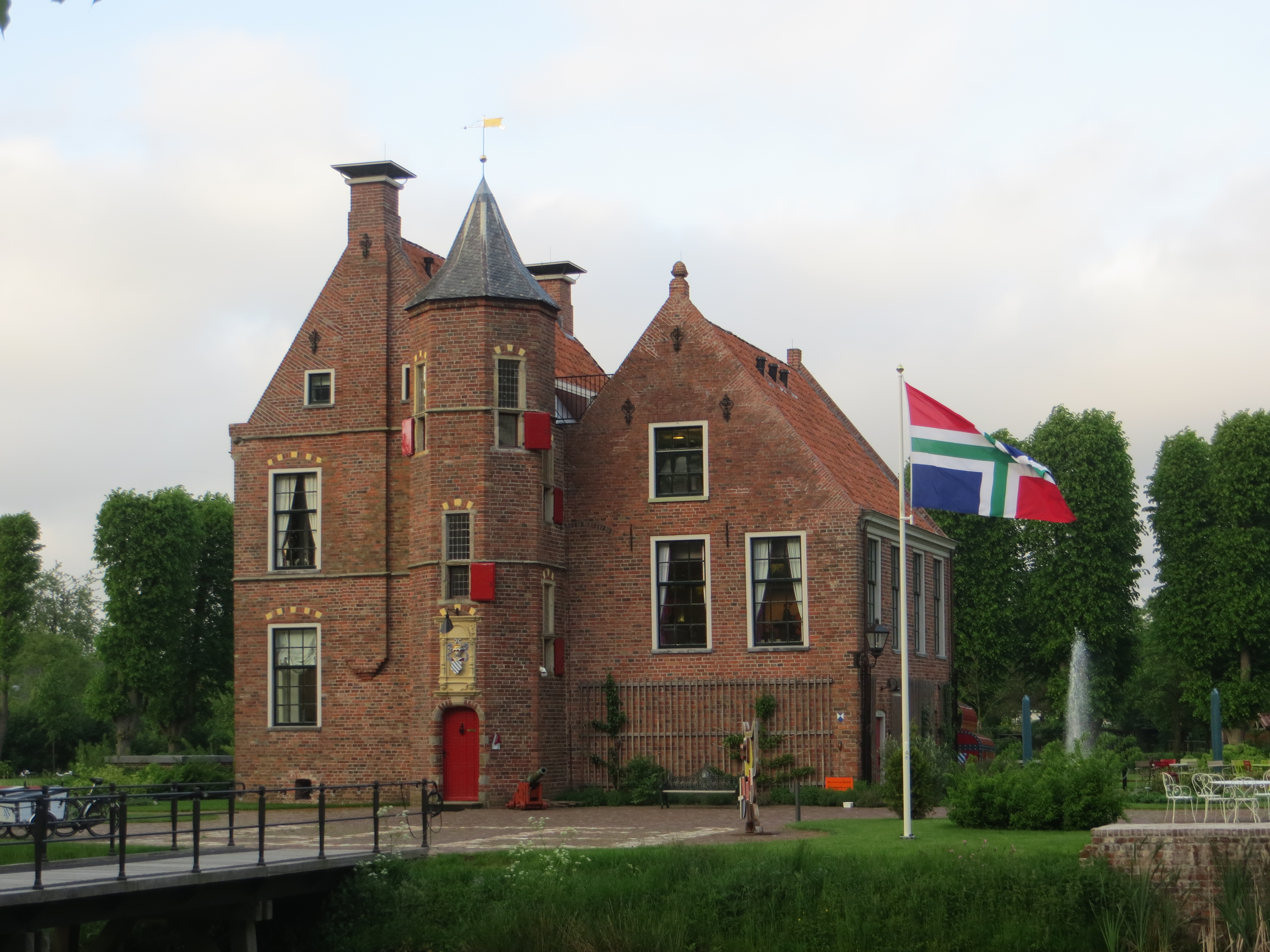 Wedderborg te Wedde